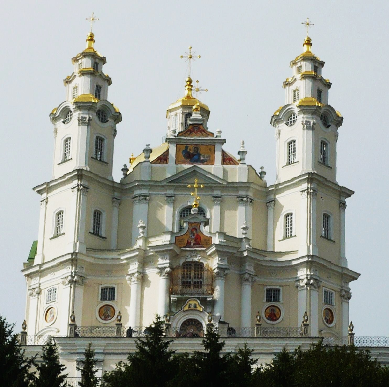 Ławra Poczajowska